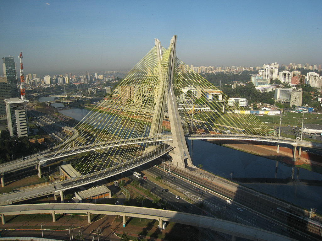 Octavio Frias de Oliveira Bridge in São Paulo, Brazil. View from the Hilton São Paulo Morumbi.